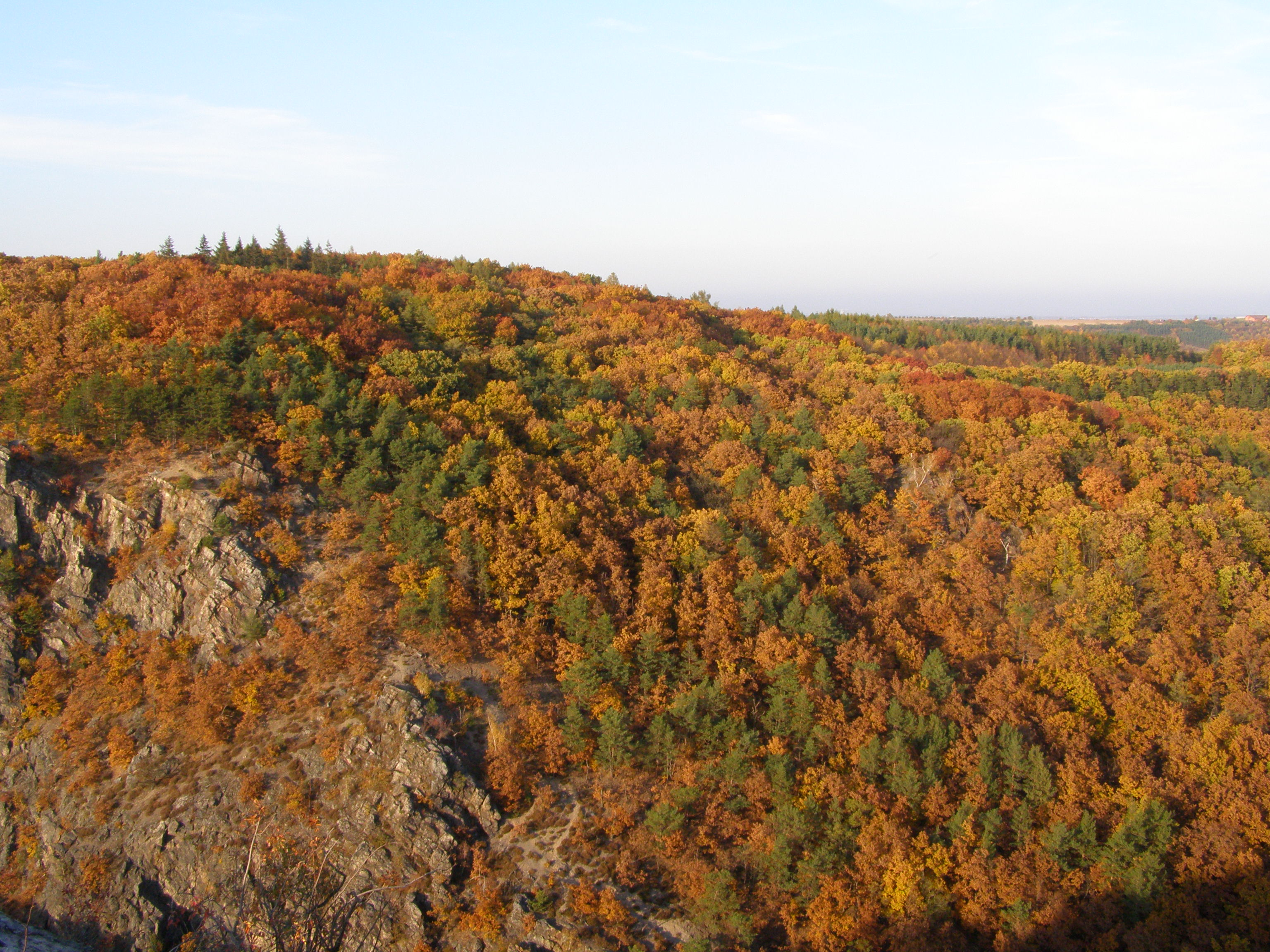 Praha, Přírodní park Šárka-Lysolaje